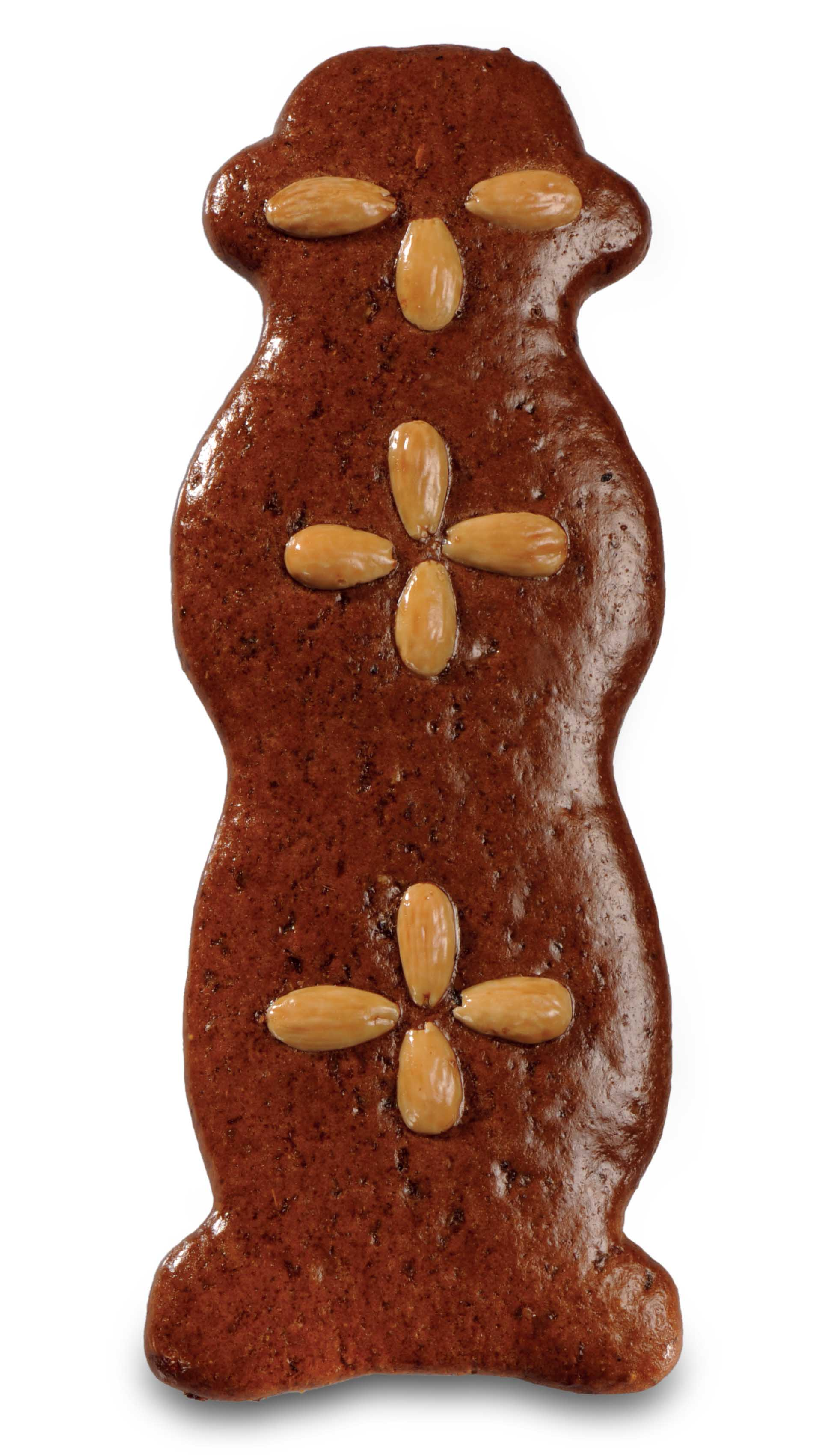 Kräuter-Mandel-Printenfigur, Nobis Printen Aachen